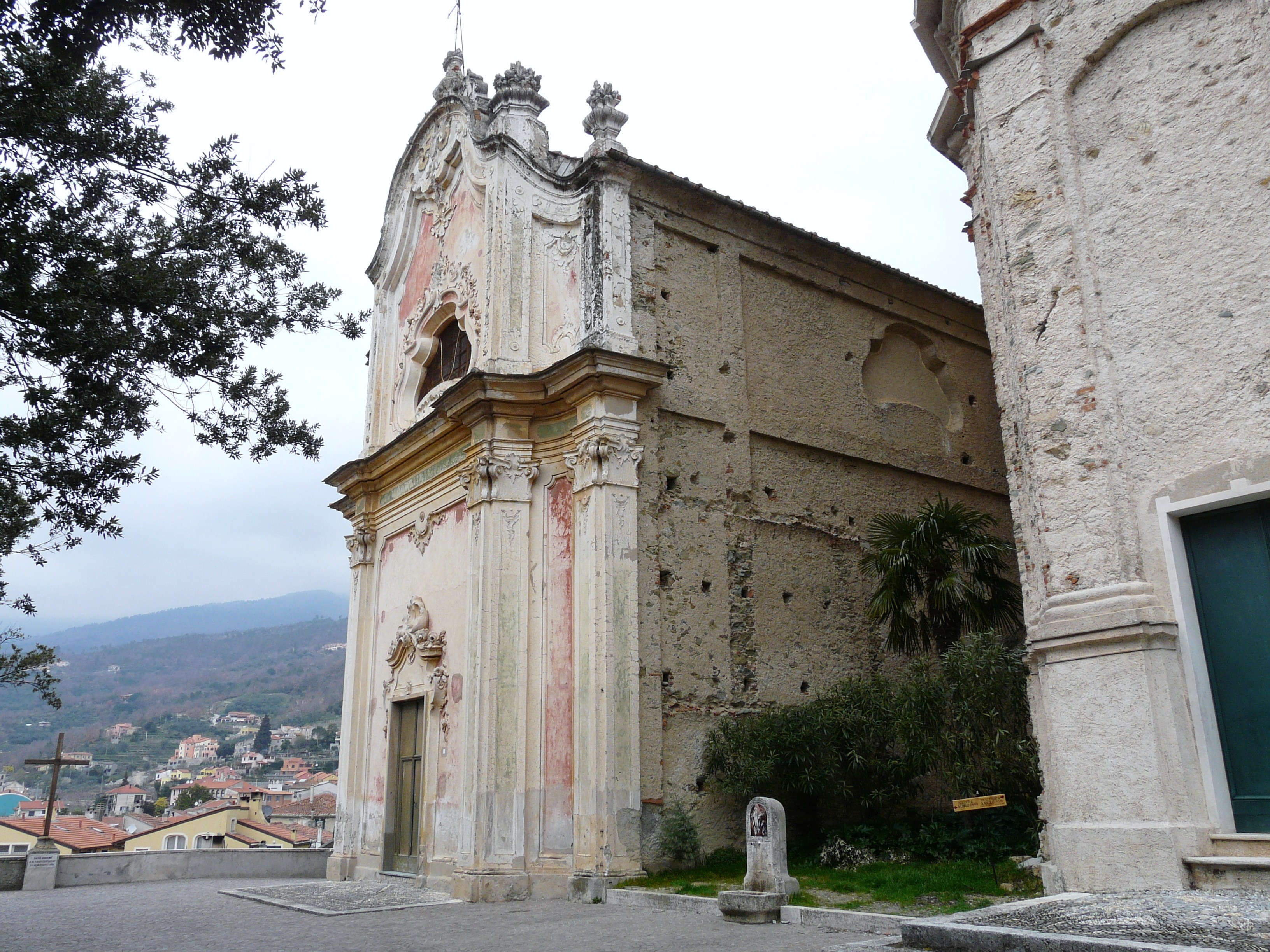 Oratorio di San Carlo, Calice Ligure, Liguria, Italia